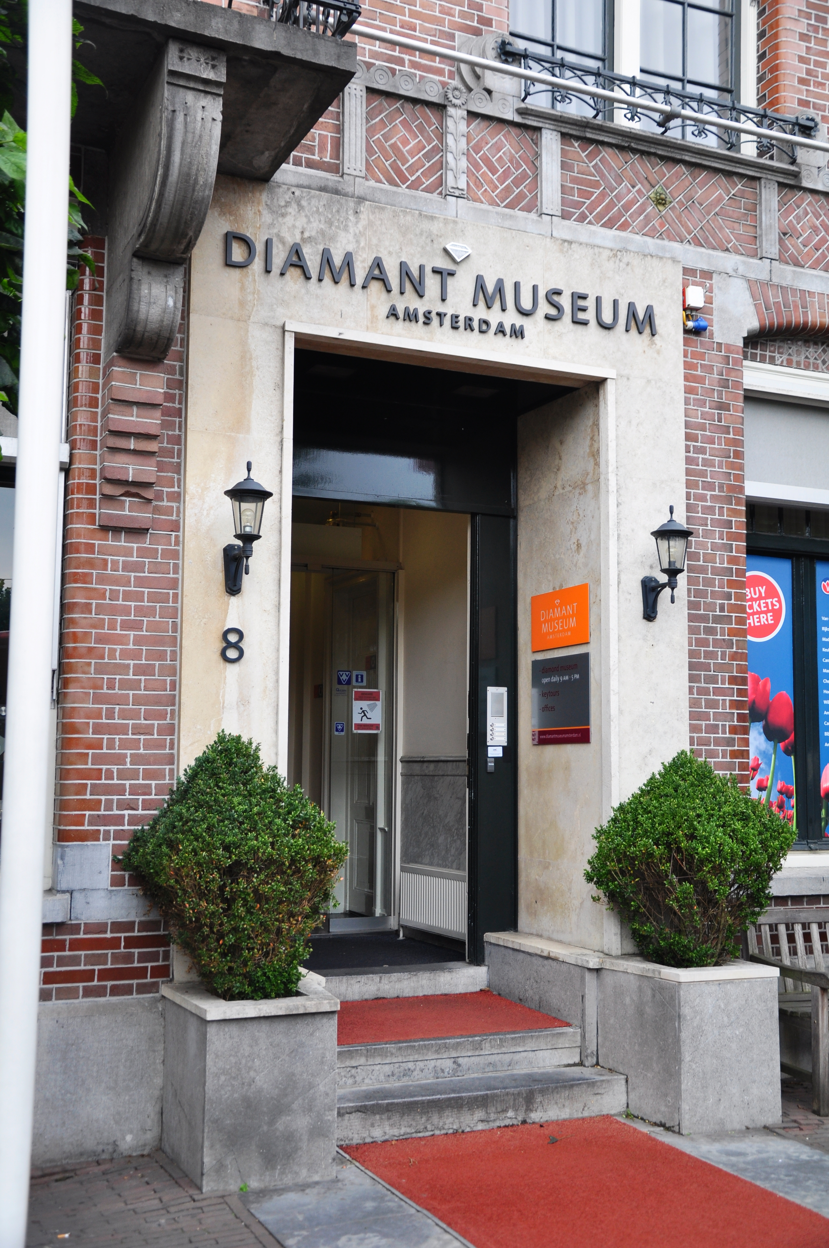 Holland, Amsterdam, Diamant-Museum